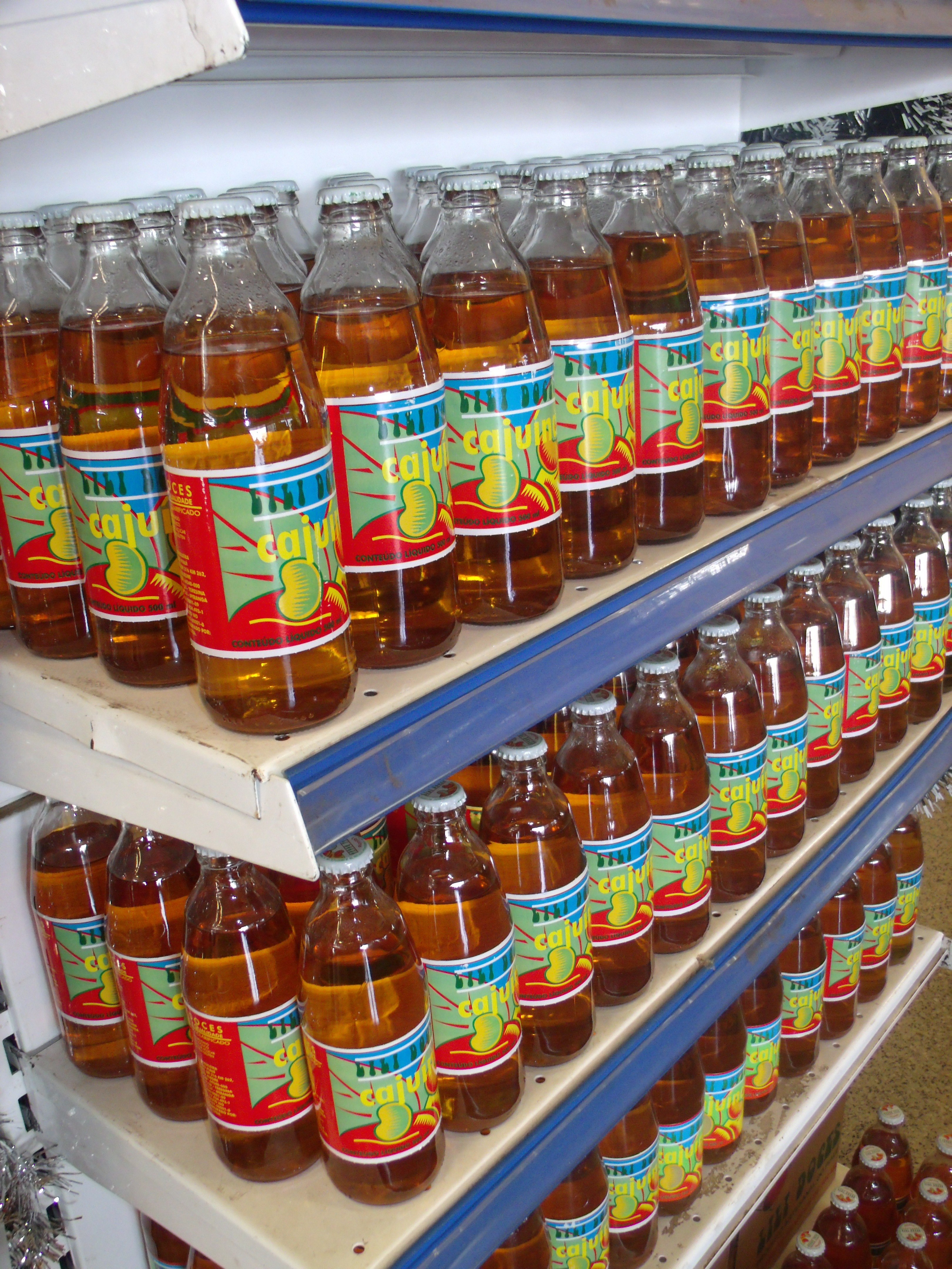 Cajuína em um supermercado no Piauí.Produzida no município de Ipiranga do Piauí.